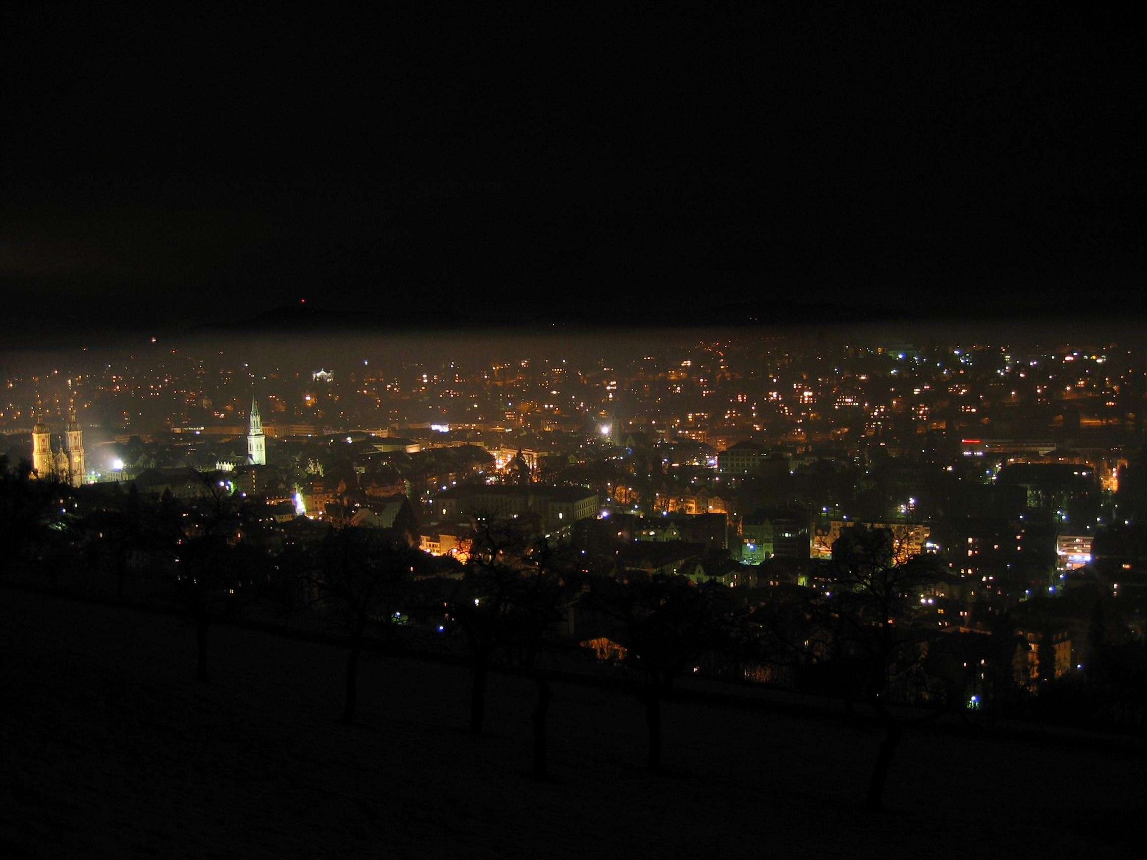 St. Gallen bei Nacht und Nebel